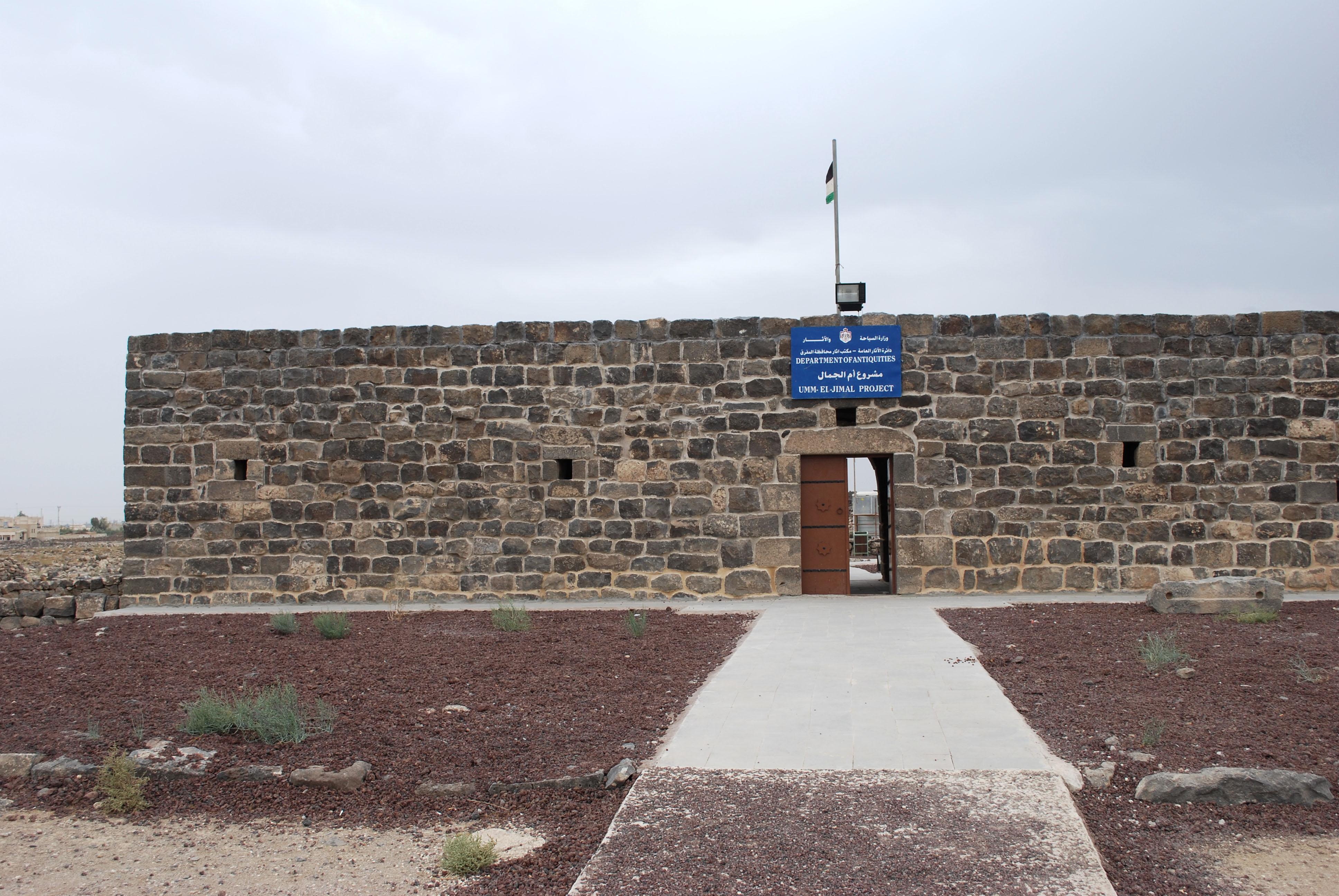 Umm al-Jamal : bâtiment du Département des Antiquités de Jordanie à l'entrée du site.